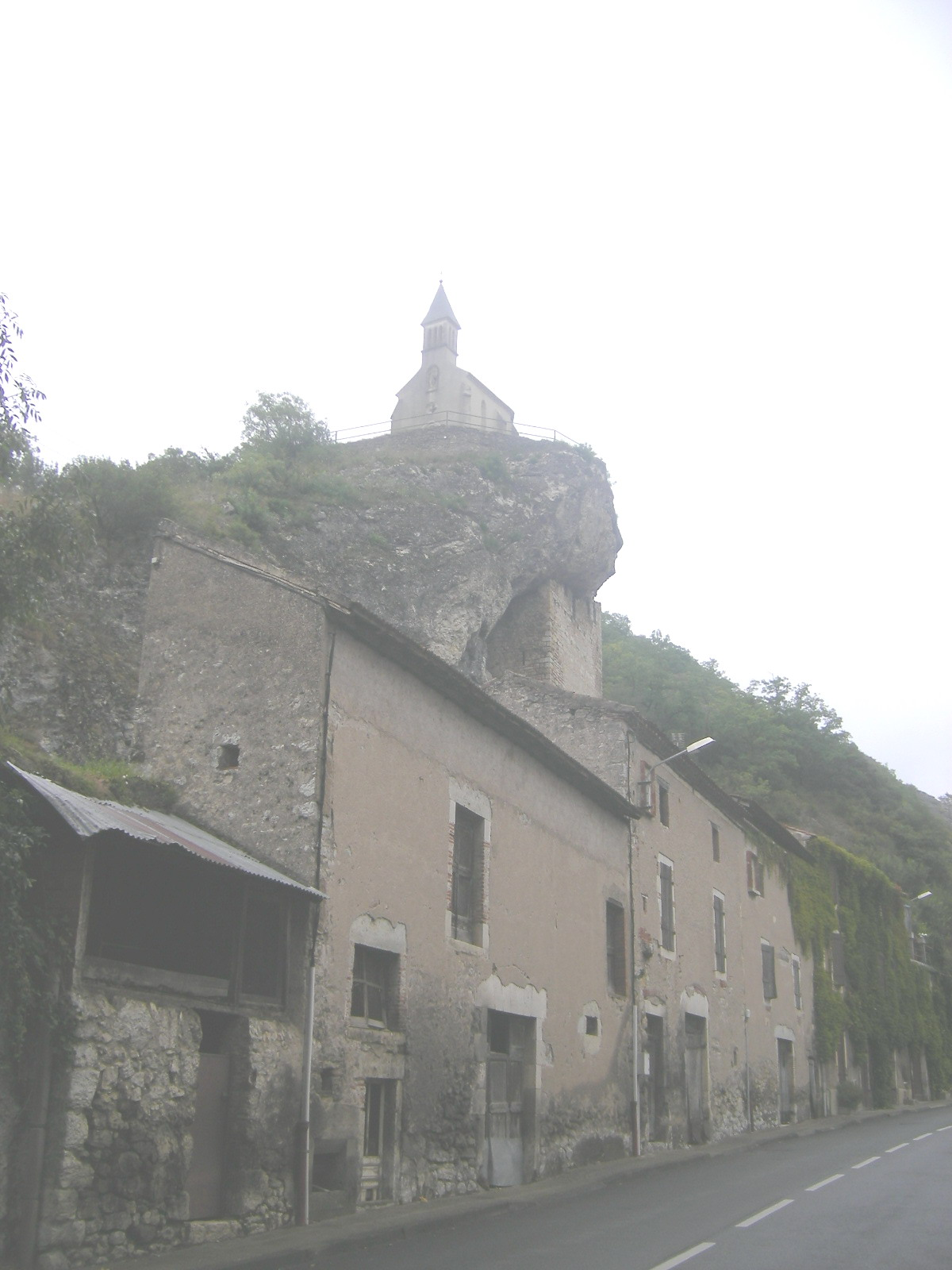 Laroque-des-Arcs